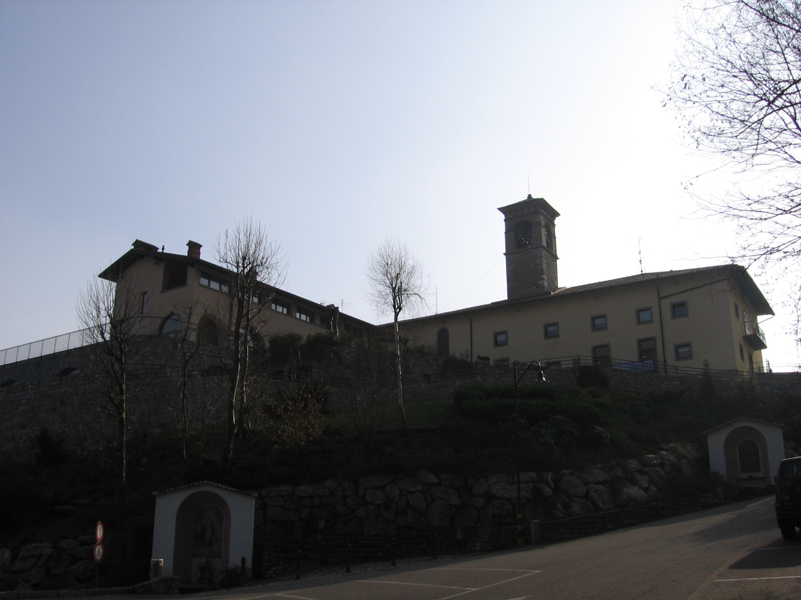 Santuario Zuccarello, Nembro, Bergamo, Italy